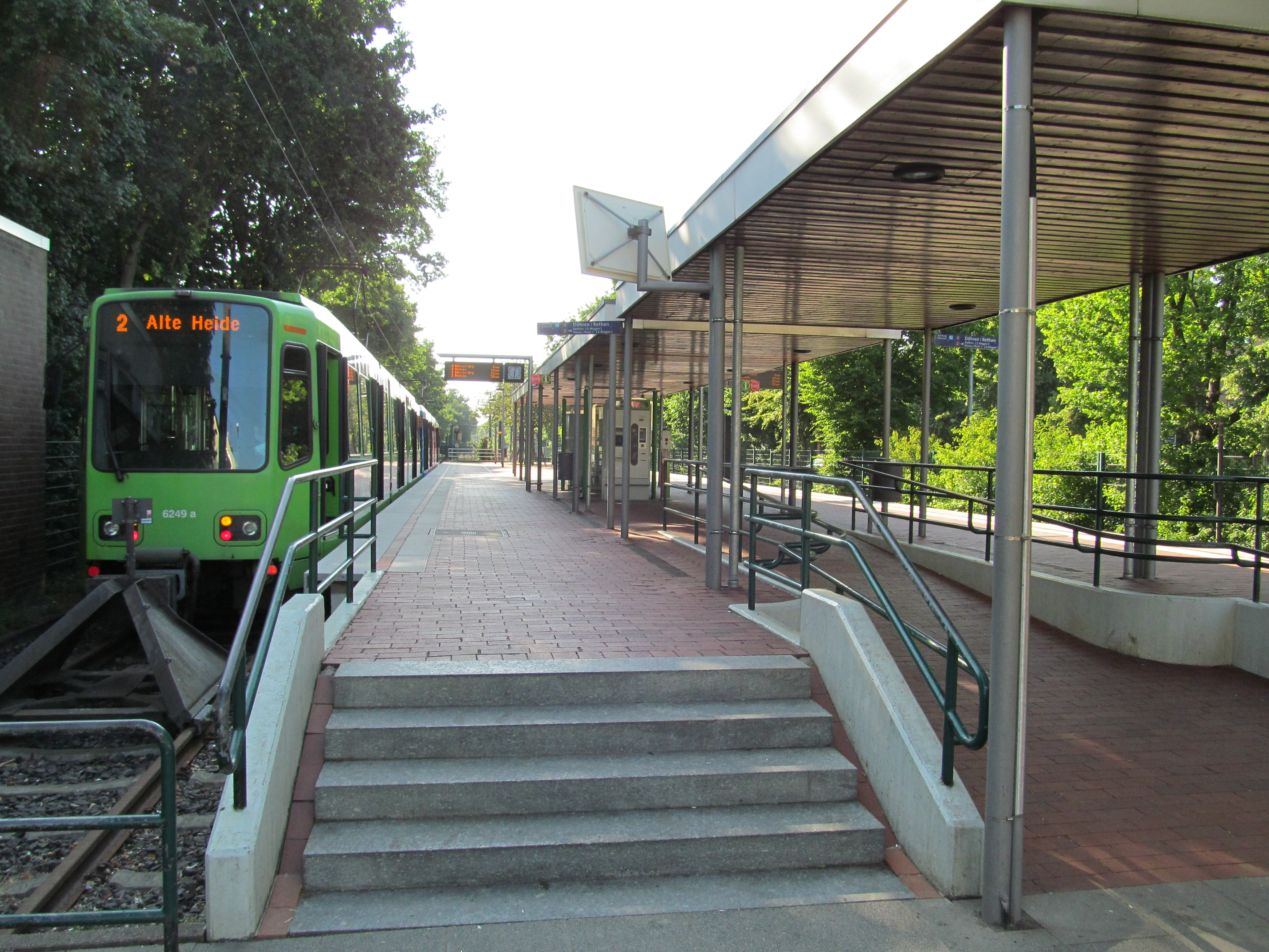 die Stadtbahnhaltestelle Alte Heide an der Kreuzung General-Wever-Straße/Kugelfangftrift in Hannover-Sahlkamp